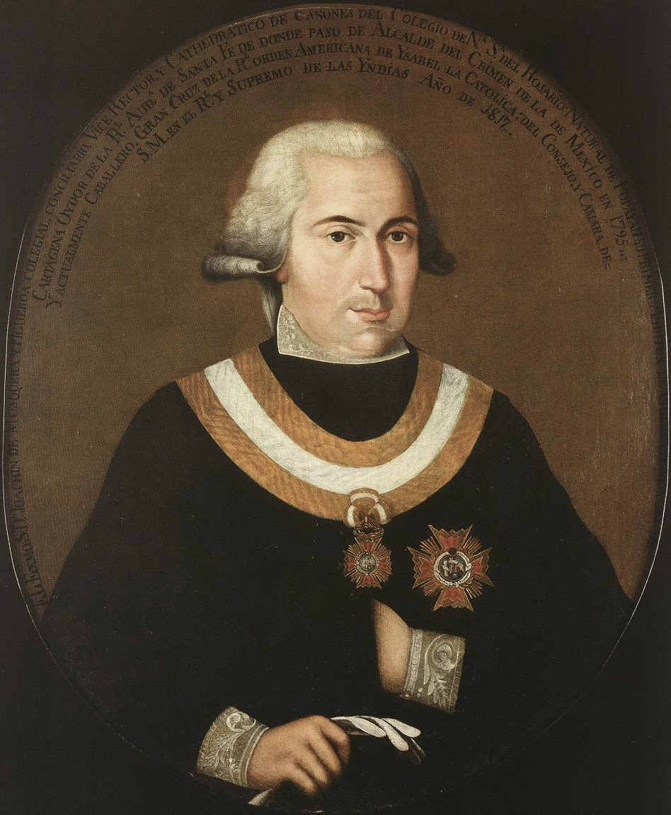 Retrato del politico Joaquín de Mosquera y Figueroa (1748-1830), que llegó a ser regente de España y falleció en Madrid en 1830.